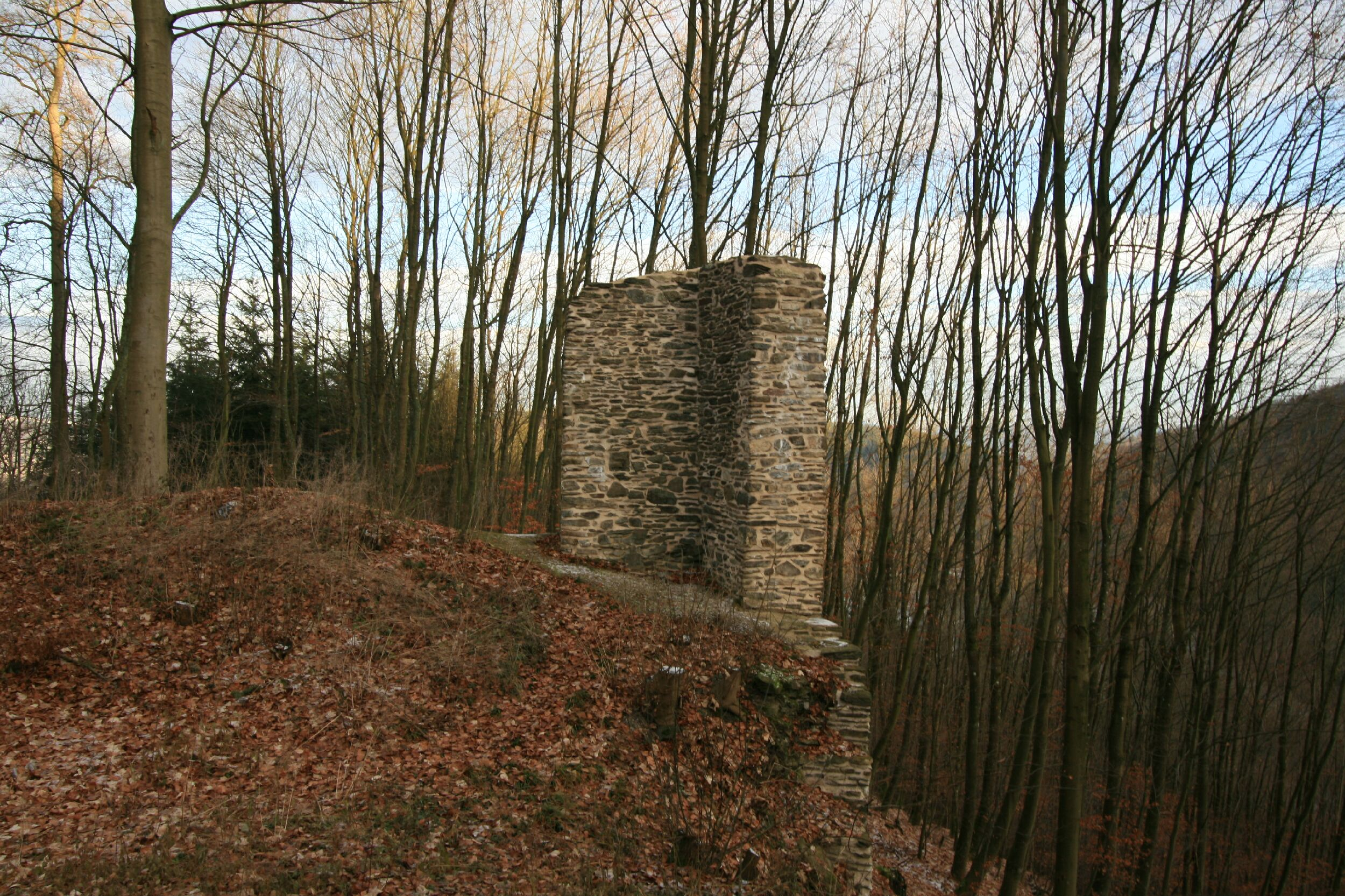 Burg Waldenburg (Attendorn) Blick nach Nord-Westen